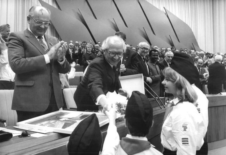 ADN-ZB-Zimmermann-24.4.86-zei-Berlin: XI. Parteitag Zum Abschluß des Parteitages am 21.4. überbrachten mehr als 1.200 Jung- und Thälmannpioniere die Grüße der Pionierorganisation "Ernst Thälmann". Sie überreichten dem Generalsekretär des ZK der SED und Vorsitzenden des Staatsrates der DDR, Erich Honecker, eine Kassette mit der Abrechnung der Ergebnisse der "Pionierexpedition - Rote Fahne". links: Michail Gorbatschow. Generalsekretär des ZK der KPdSU.